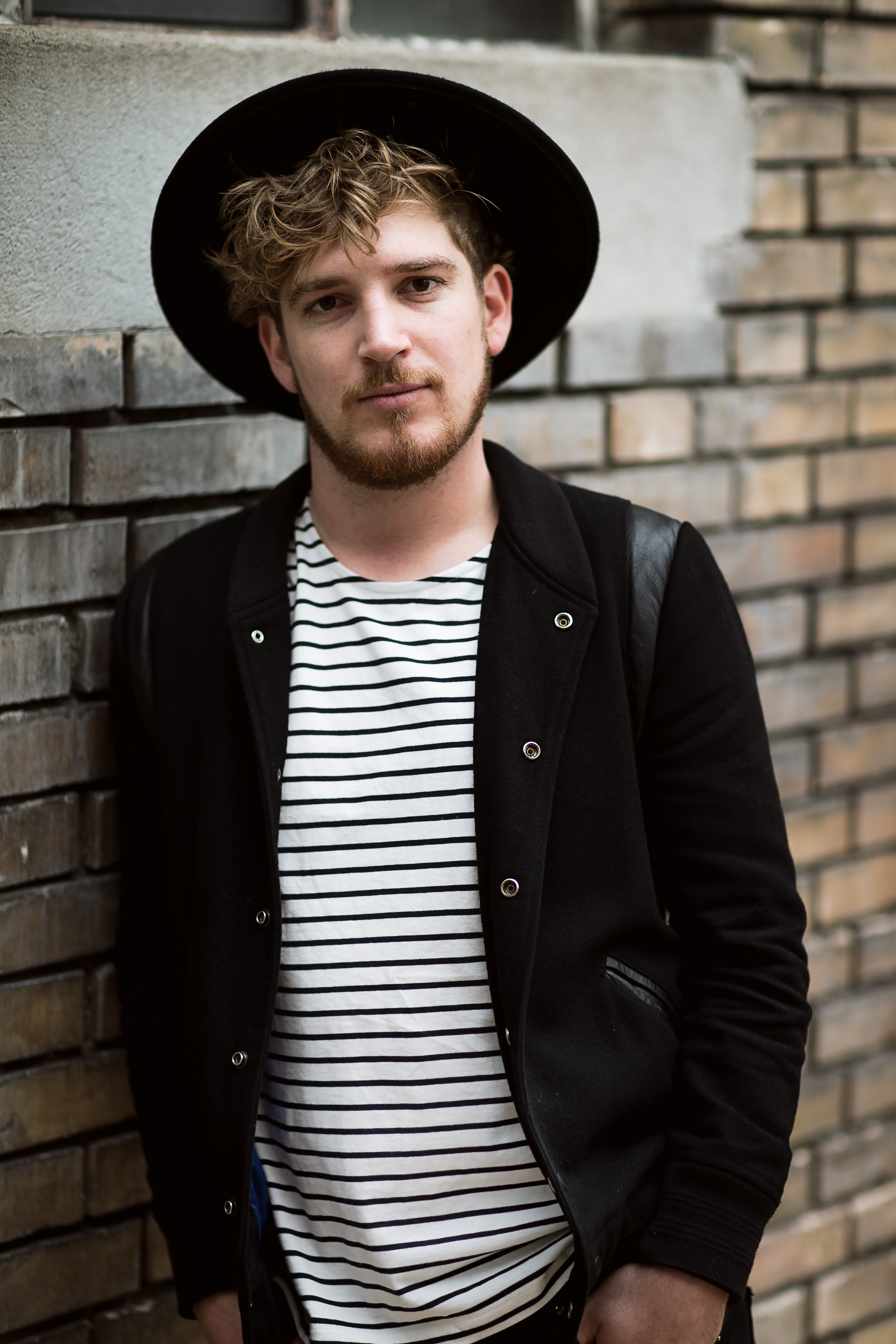 Gabriel Spahni (Bass, Gesang)